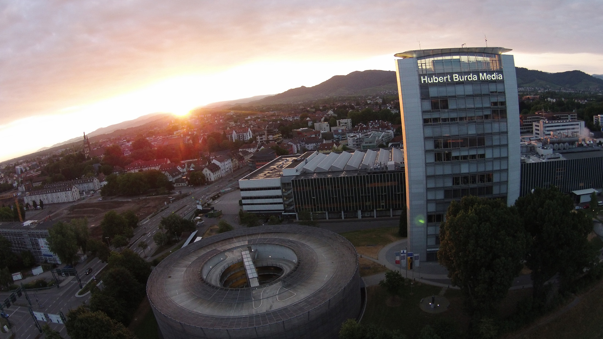 Auf diesem Foto ist der Burda Media Tower des Burda-Verlags in Offenburg im Vordergrund, mit einem Sonnenaufgang über Offenburg Schwarzwald im Hintergrund zu sehen. Die Aufnahme wurde aus ca. 70 Metern Höhe geschossen.